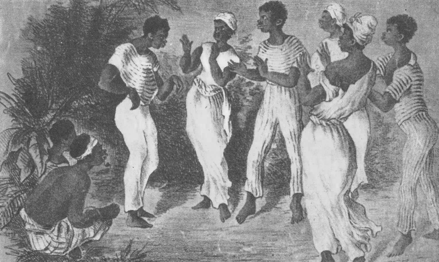 Dança Batuque. Costumes do Rio de Janeiro, 1835.